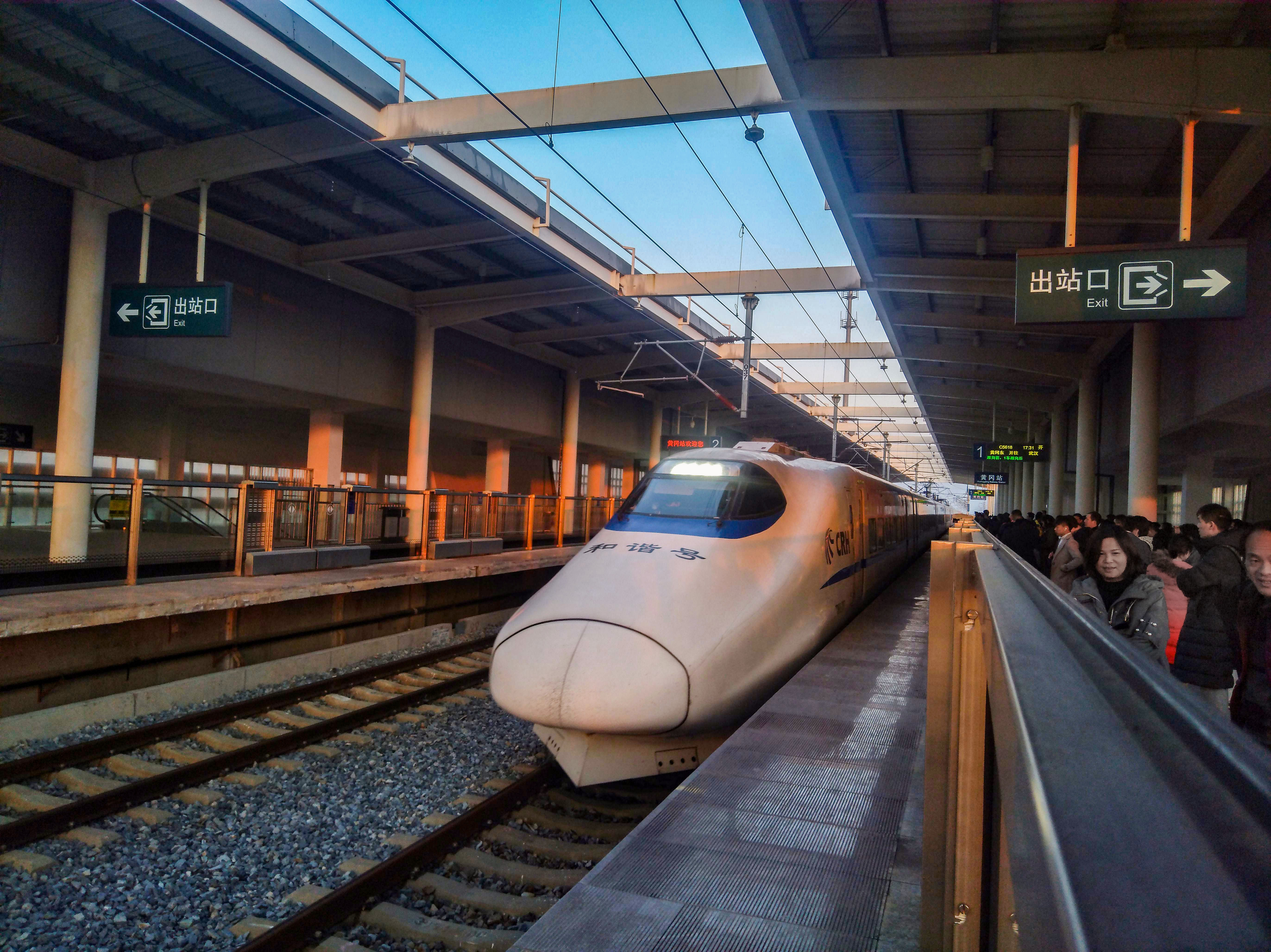 非统型CRH2A担当的C5618次列车正线停于黄冈站内的武冈城际铁路正线